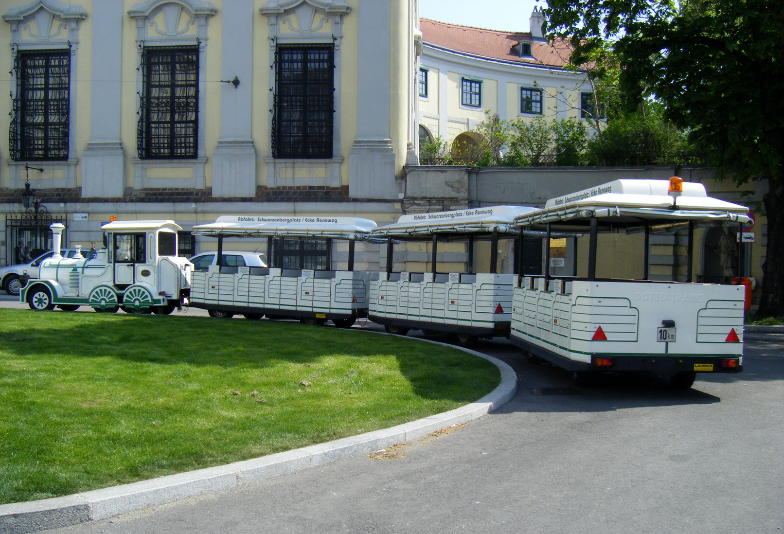 Palais Schwarzenberg am Schwarzenbergplatz an der Ecke zum Rennweg.